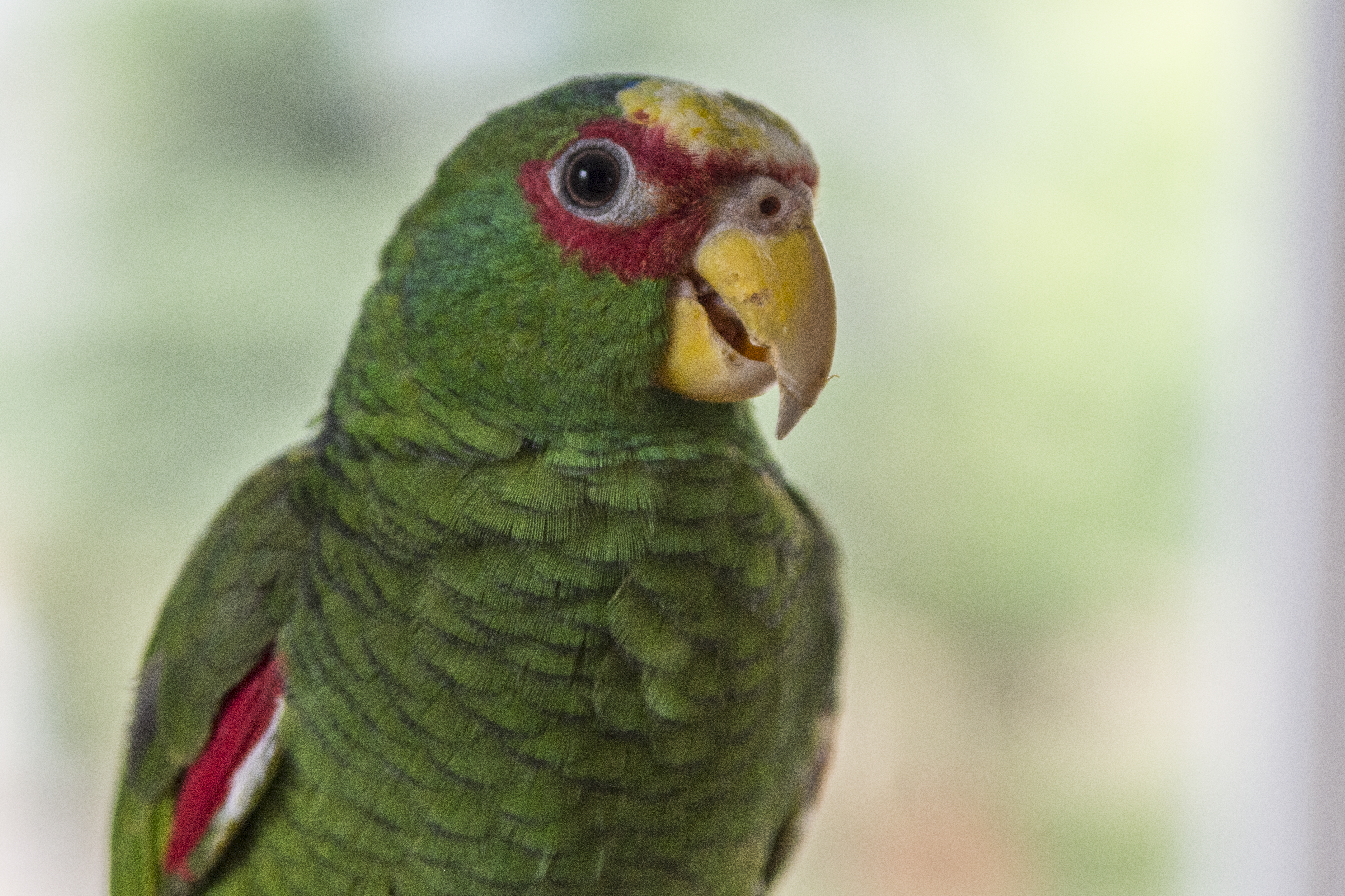 Samiec amazonki białoczelnej z podgatunku albifrons.